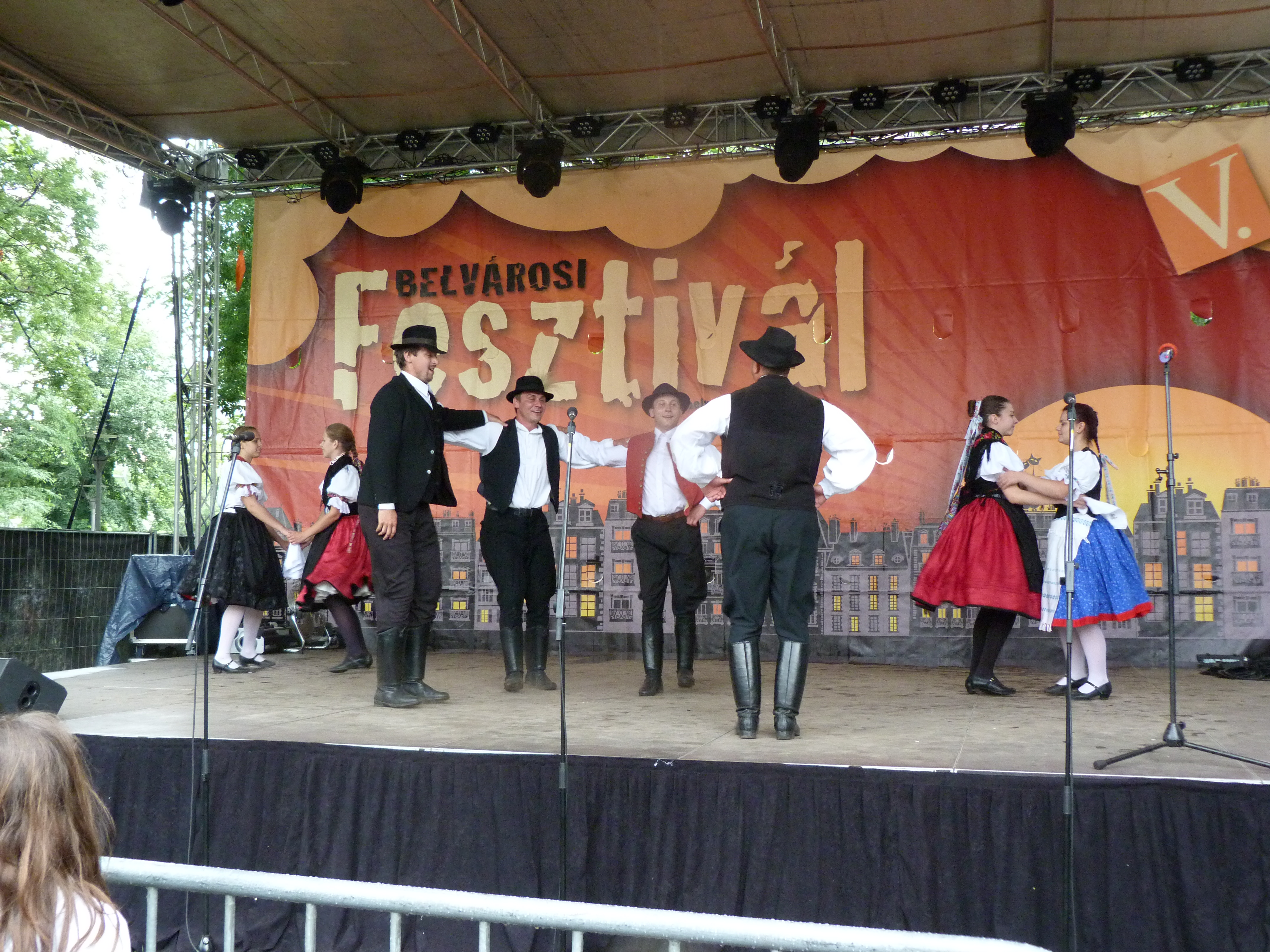 A Búzavirág Együttest 1980-ban alakította meg Csunyocska Árpádné pedagógus. Előbb egy lánycsoporttal kezdte, majd egy fellépés alkalmával Mezőkövesden találkozott Adorján Lajos koreográfussal, aki elvállalta, hogy havonta Rozsnyón oktatja az újdonsült együttest. Eleinte főleg gömöri, szilicei táncokat dolgoztak fel, majd a Medvesalját vették sorra. Novák Ferenc támogatta a csoportot, hortobágyi botos táncokat dolgozott fel velük, Nagy Zoltán József több műsor összeállítását is segítette. Jártak Litvániában, Görögországban, Németországban, Hollandiában és természetesen számtalan alkalommal Magyarországon. Erejük teljében akkor voltak, amikor évi 30 fellépést is el tudtak vállalni. Források: Jubilált a rozsnyói Búzavirág néptáncegyüttes